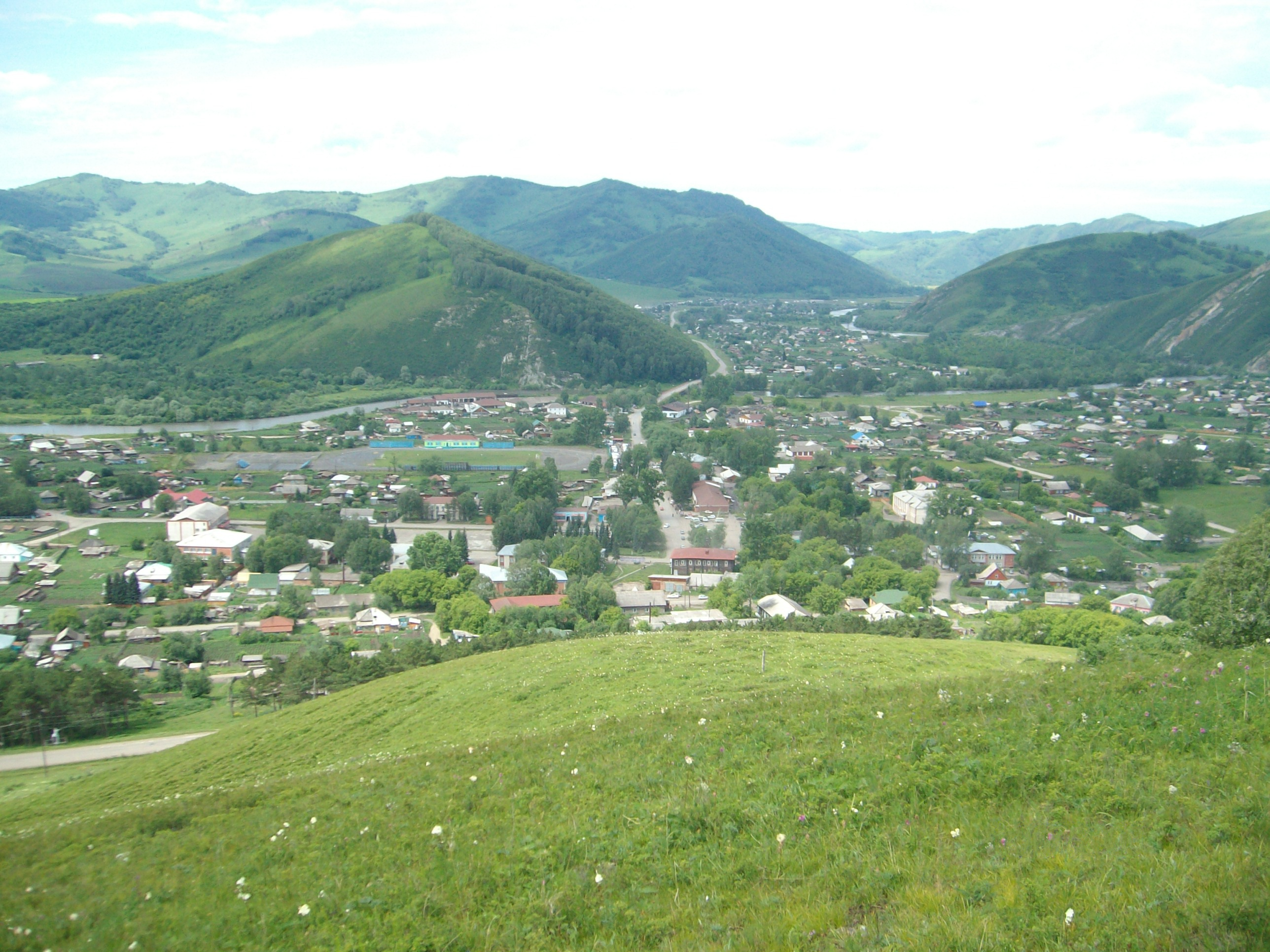 Село Солонешное центральная часть, долина реки Ануй, Солонешенский район, Алтайский край